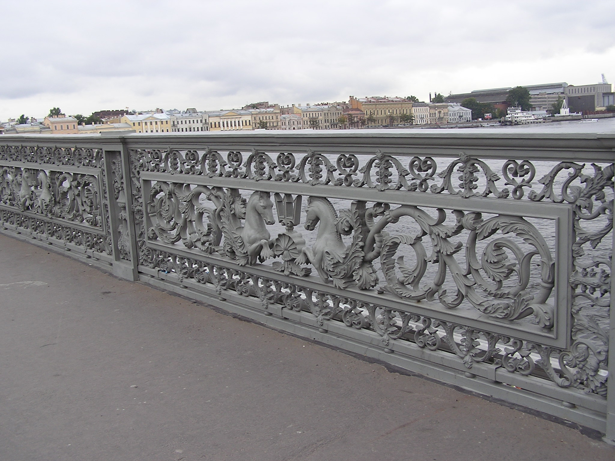 Санкт-Петербург. Решетка моста лейтенанта Шмидта